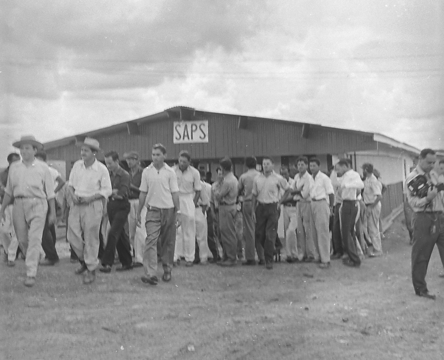 Imagem do Fundo Agência Nacional, do Arquivo Nacional